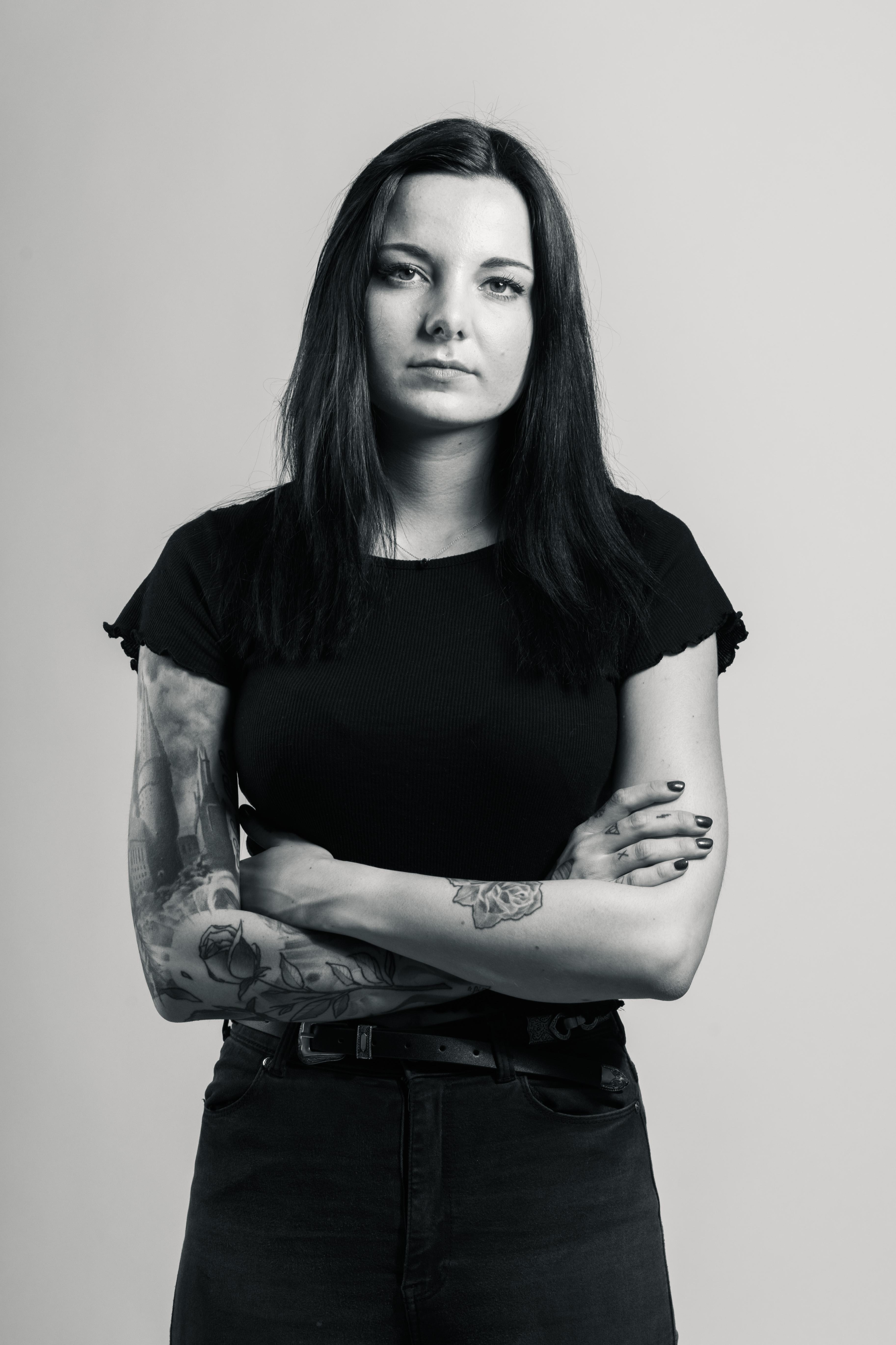 Andrina Travers, 2018.